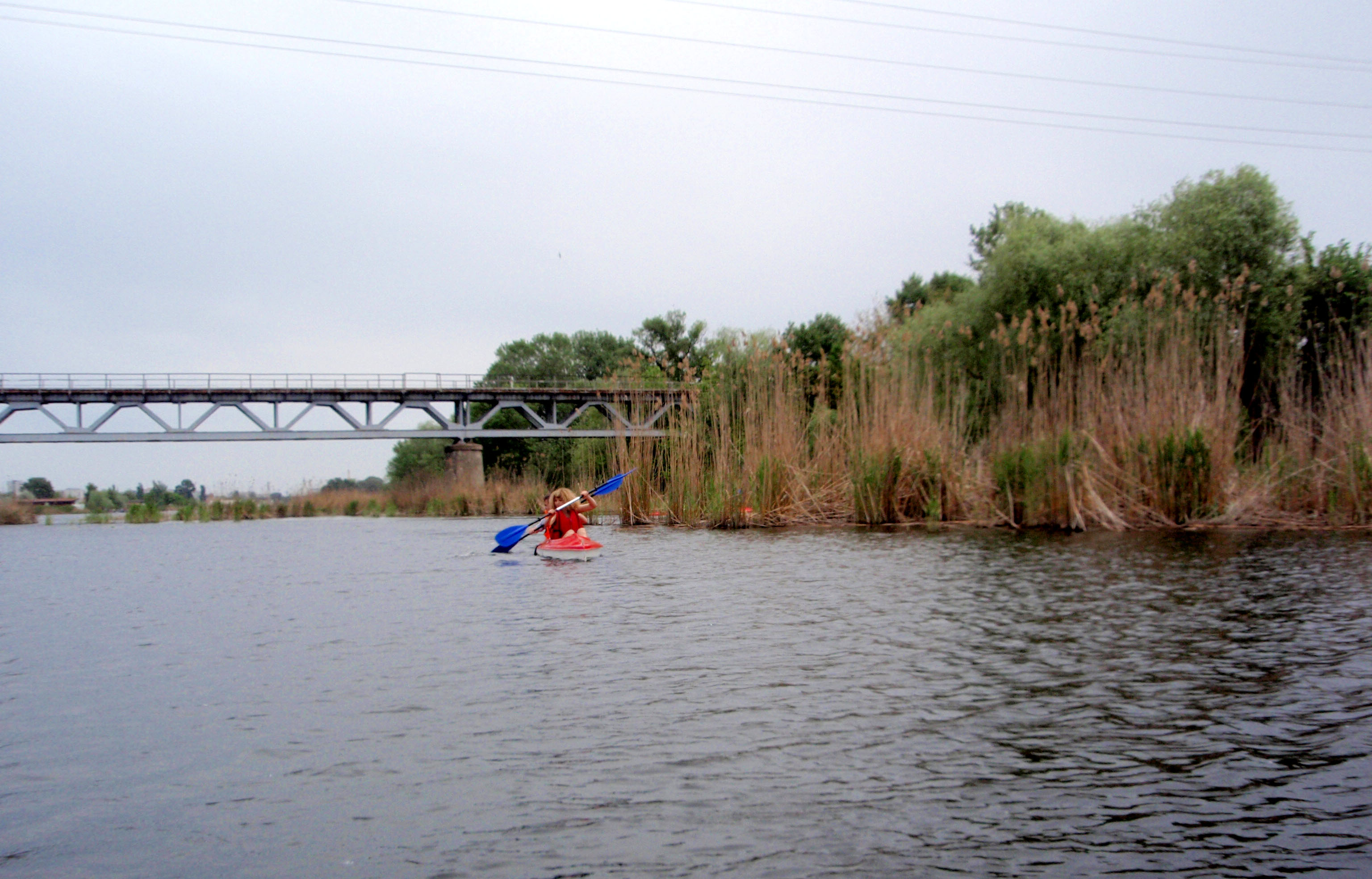 Веслувальники на річці Кошовій, травень 2010 р.